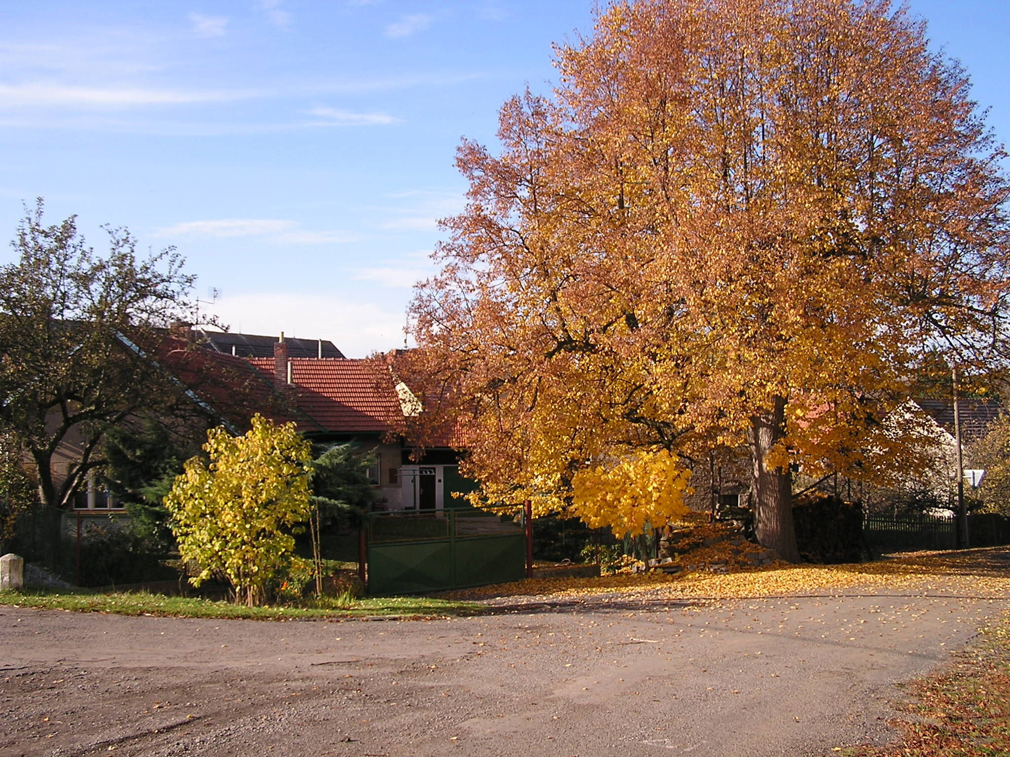 Chroustkov náves